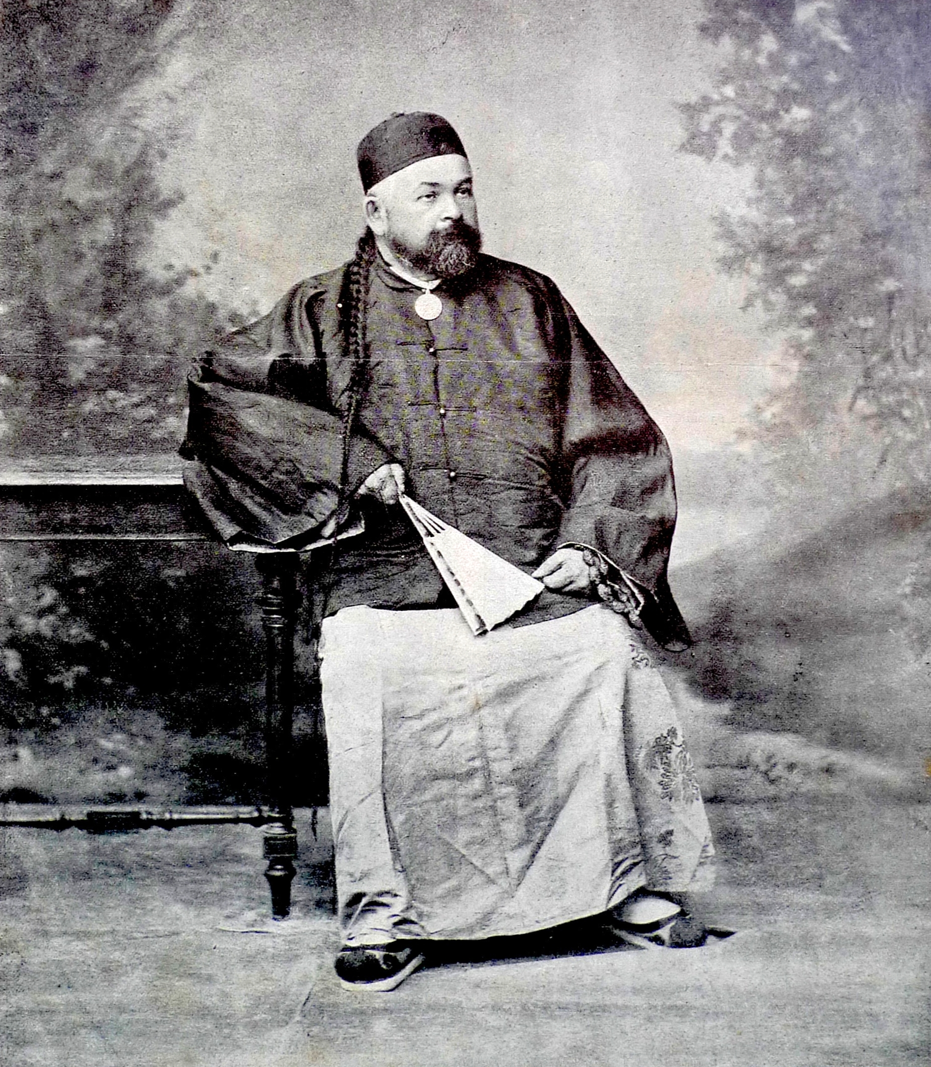 Тихомиров, Владимир Андреевич